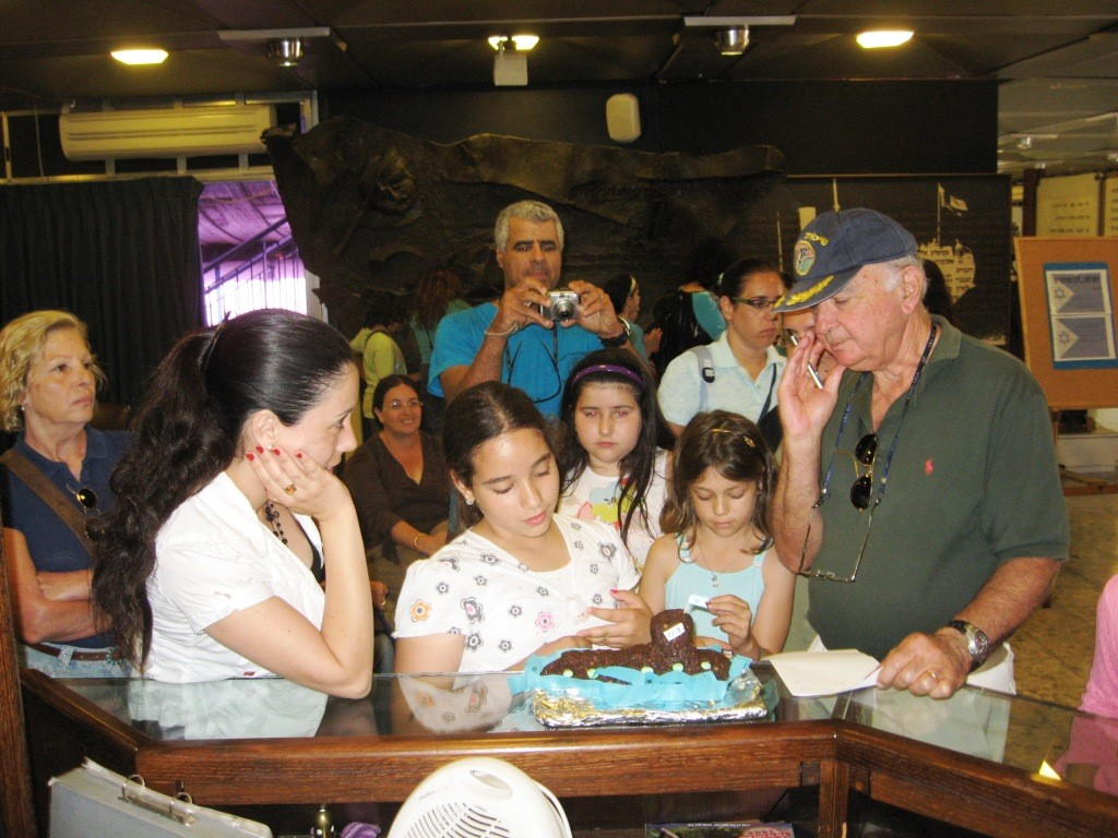 גדעון רז מנחה נוער המשתתף בתחרות אדם וים